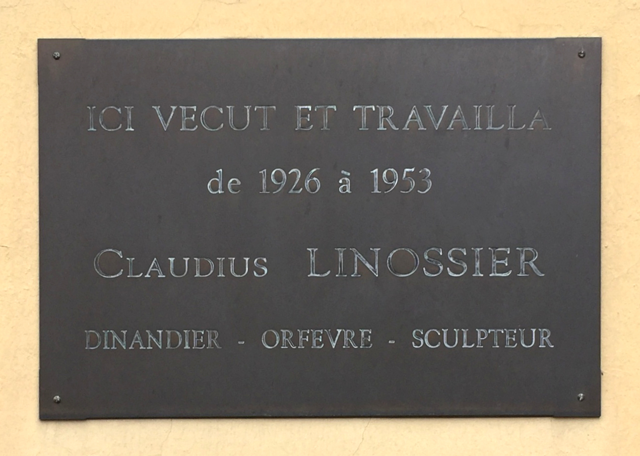 Plaque hommage à Claudius Linossier, Lyon 4e.